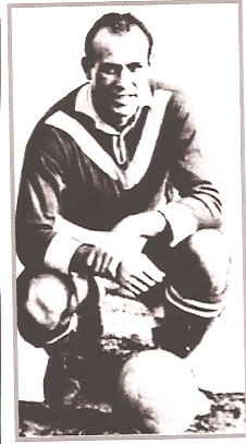 Protrait de Marcel Rouviere Footballeur. Archives familiales